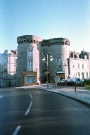 002_NC Porte beucheresse Mayenne France 050113small Melusin Propriétaire des négatifs.